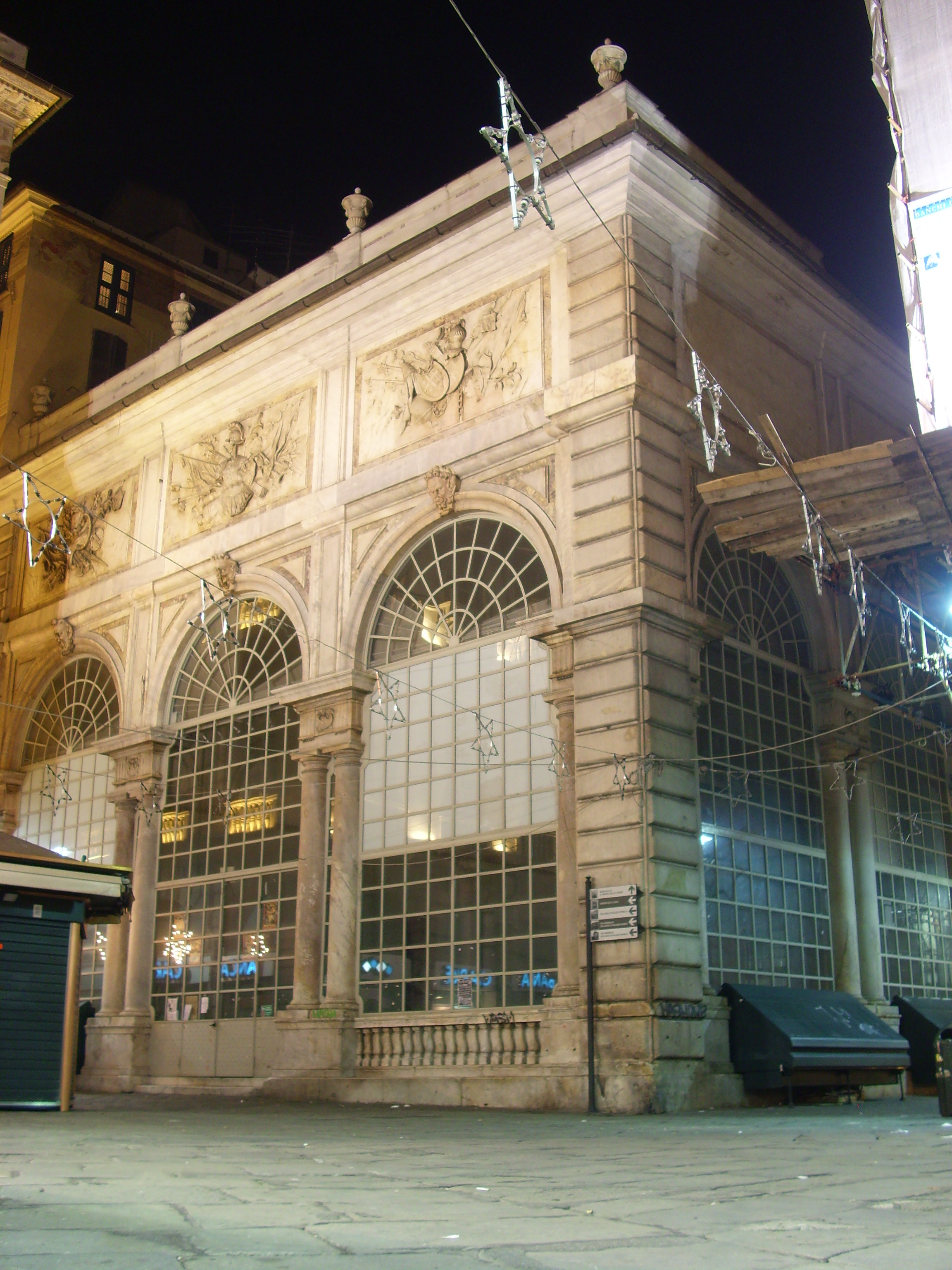 Loggia dei Mercanti (o Loggia della Mercanzia o di San Pietro in Banchi) in piazza Bachi, a Genova. Fu eretta nel XVI secolo da Andrea Ceresola (conosciuto come "il Vannone"), e da G. Donzello.